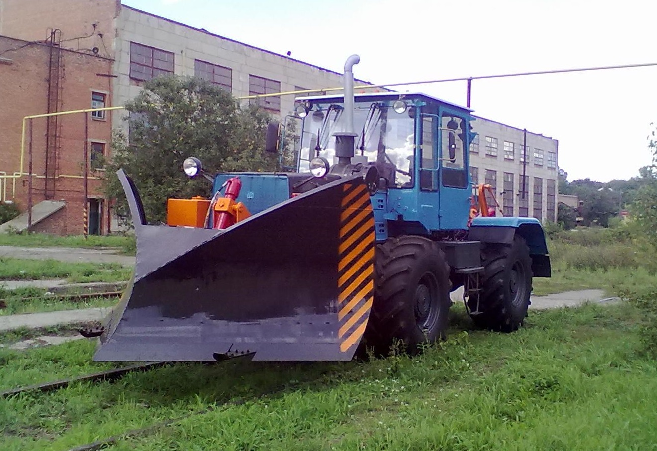 Колесно-рельсовый тягач (локомобиль, мотовоз) КРТ-1